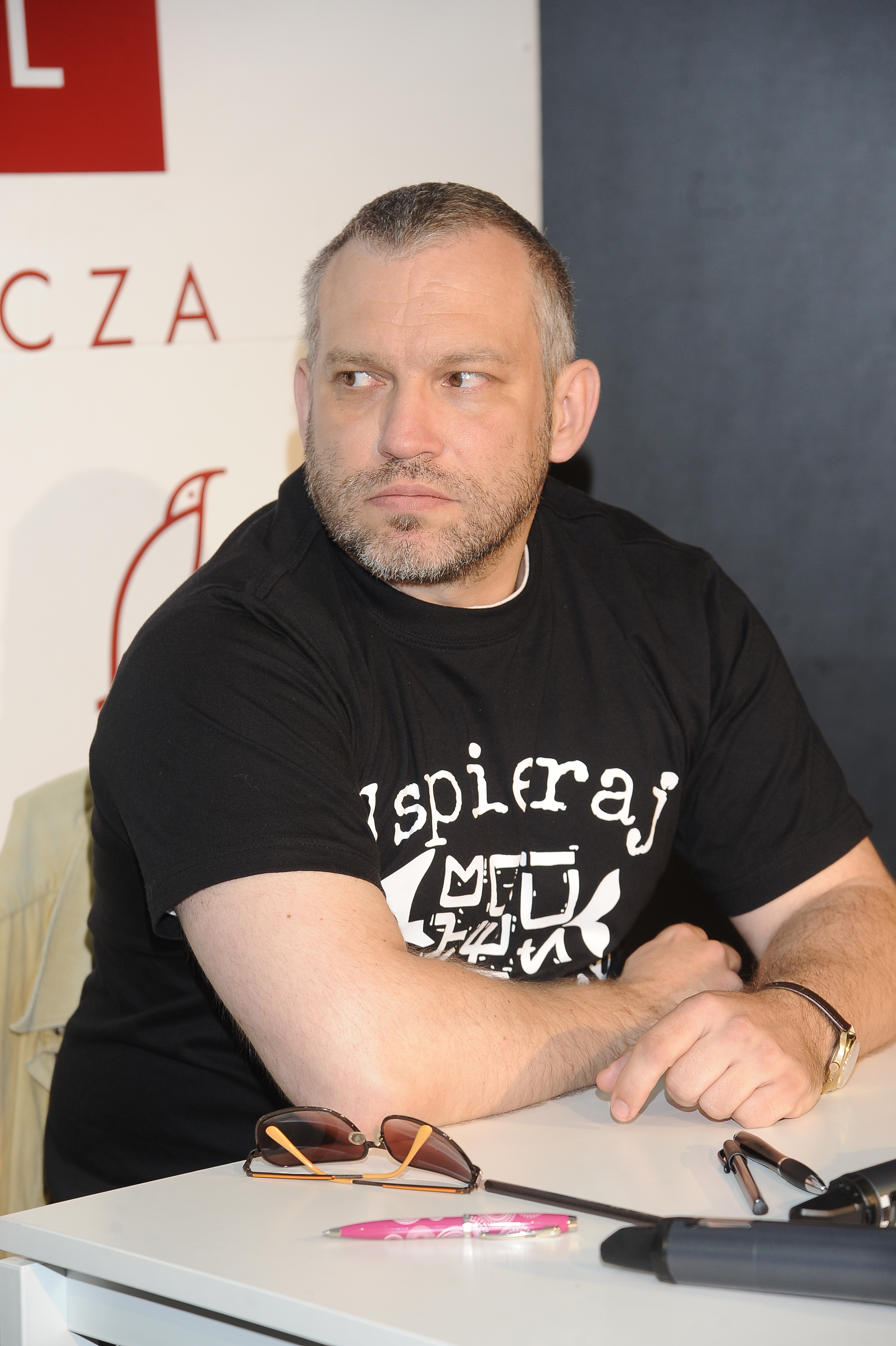 Mariusz Czubaj podczas Warszawskich Targów Książki w 2015 r.